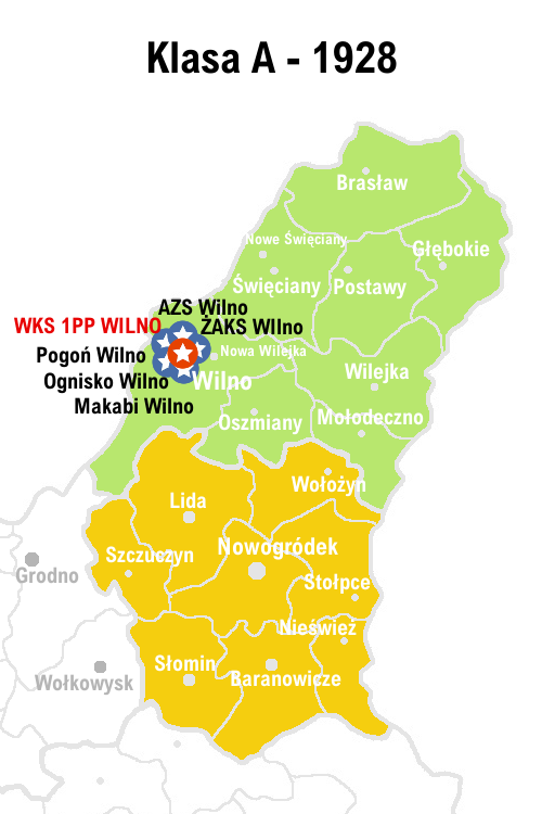 Rozgrywki w piłce nożnej w Wileńskim OZPN w 1928 roku